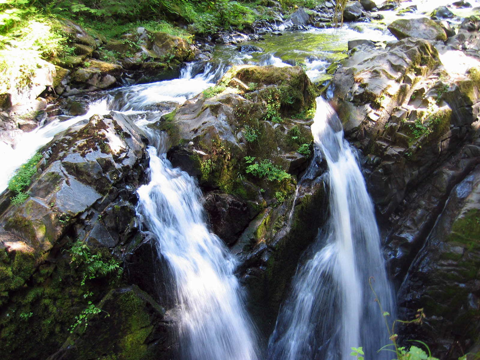 Sol Duc Falls